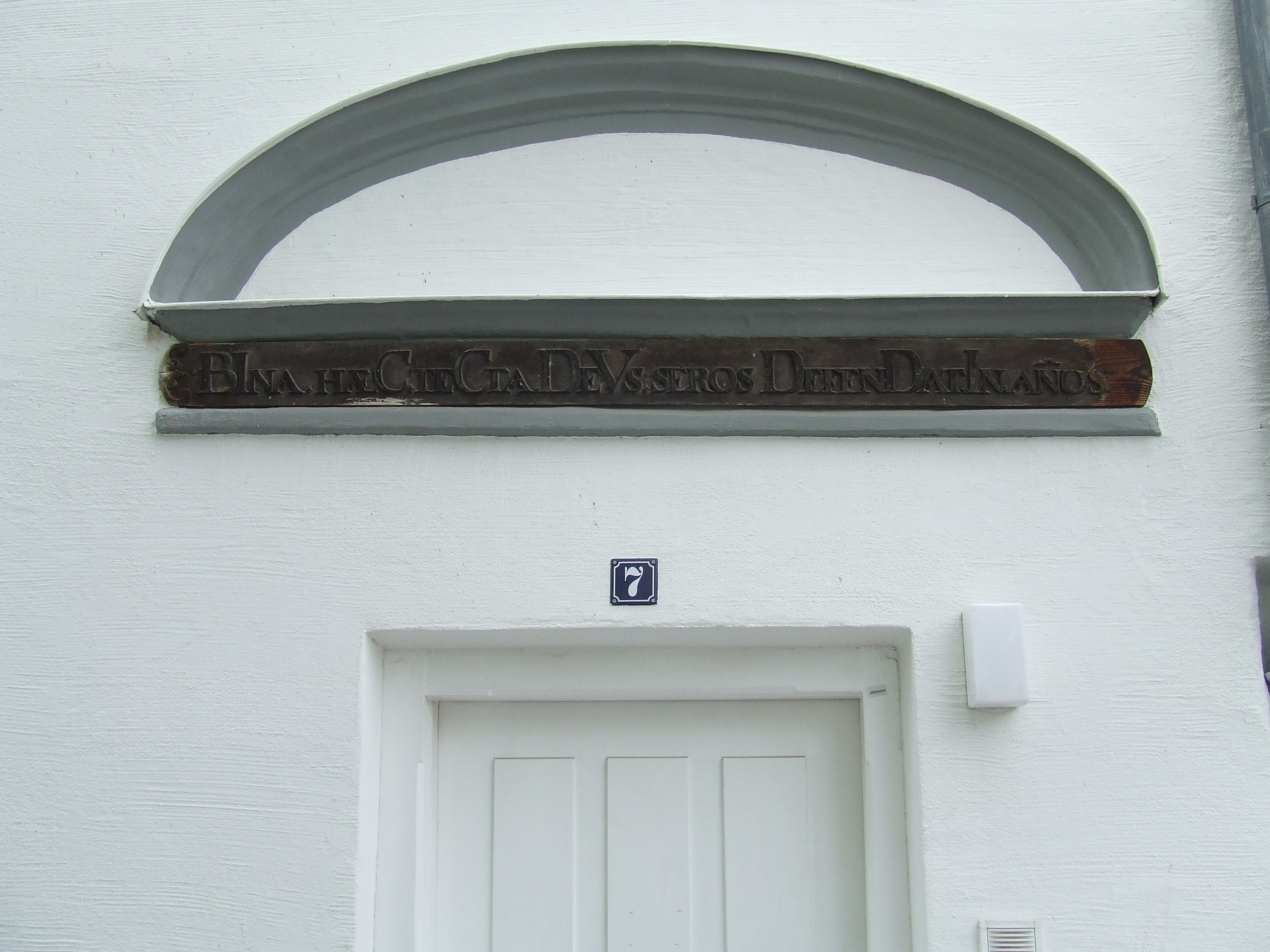 Augsburg, Reitmayrgäßchen 7, lateinische Inschrift über der Tür: "BIna haeC teCta DeVs seros DefenDat In annos" = "Dieses Doppeldachhaus möge Gott verteidigen bis in späte Jahre". Das Chronogramm ICCDVDDI (ohne das B, das nur den Satzanfang markiert) ergibt 1707.